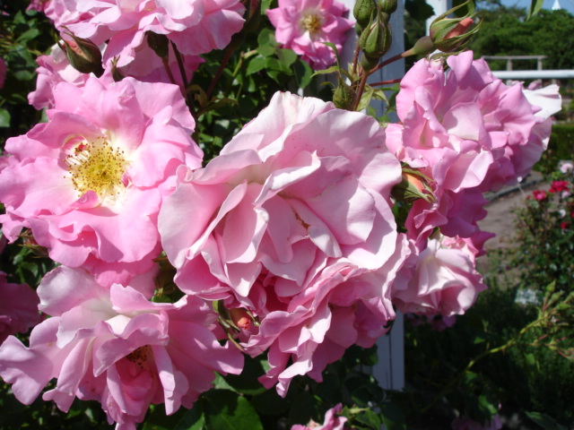 Rose 'Korberuhig' (Kordes 1996) MANITA™